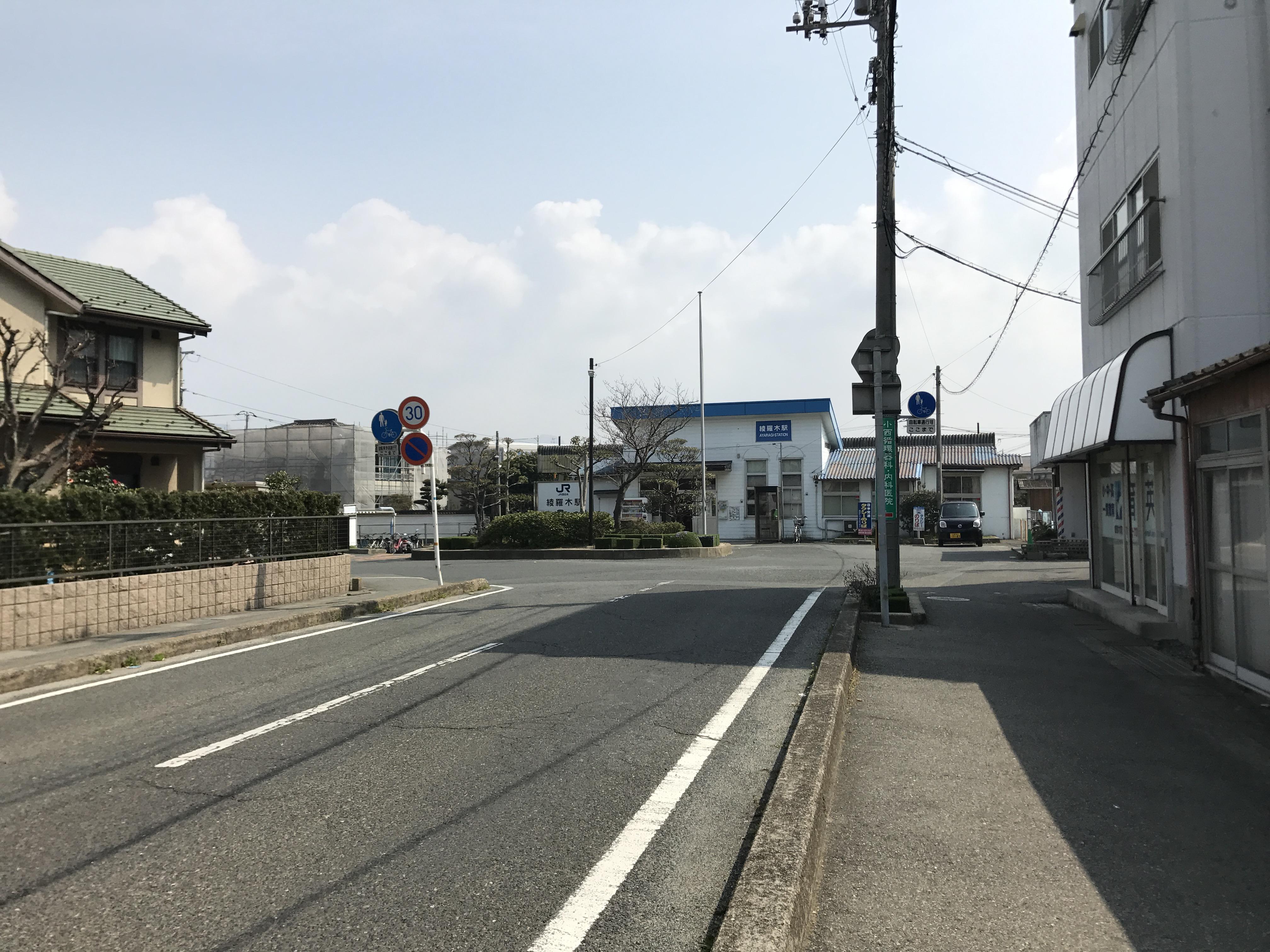 綾羅木駅の遠景